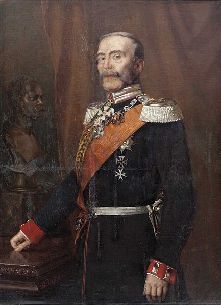 Friedrich Wilhelm Karl von Grabow (1783-1868) - Kniebild des Generaladjutanten König Wilhelms I. in der Uniform des 1. Garderegiments zu Fuß. Links hinter v. Grabow die Büste des Königs.